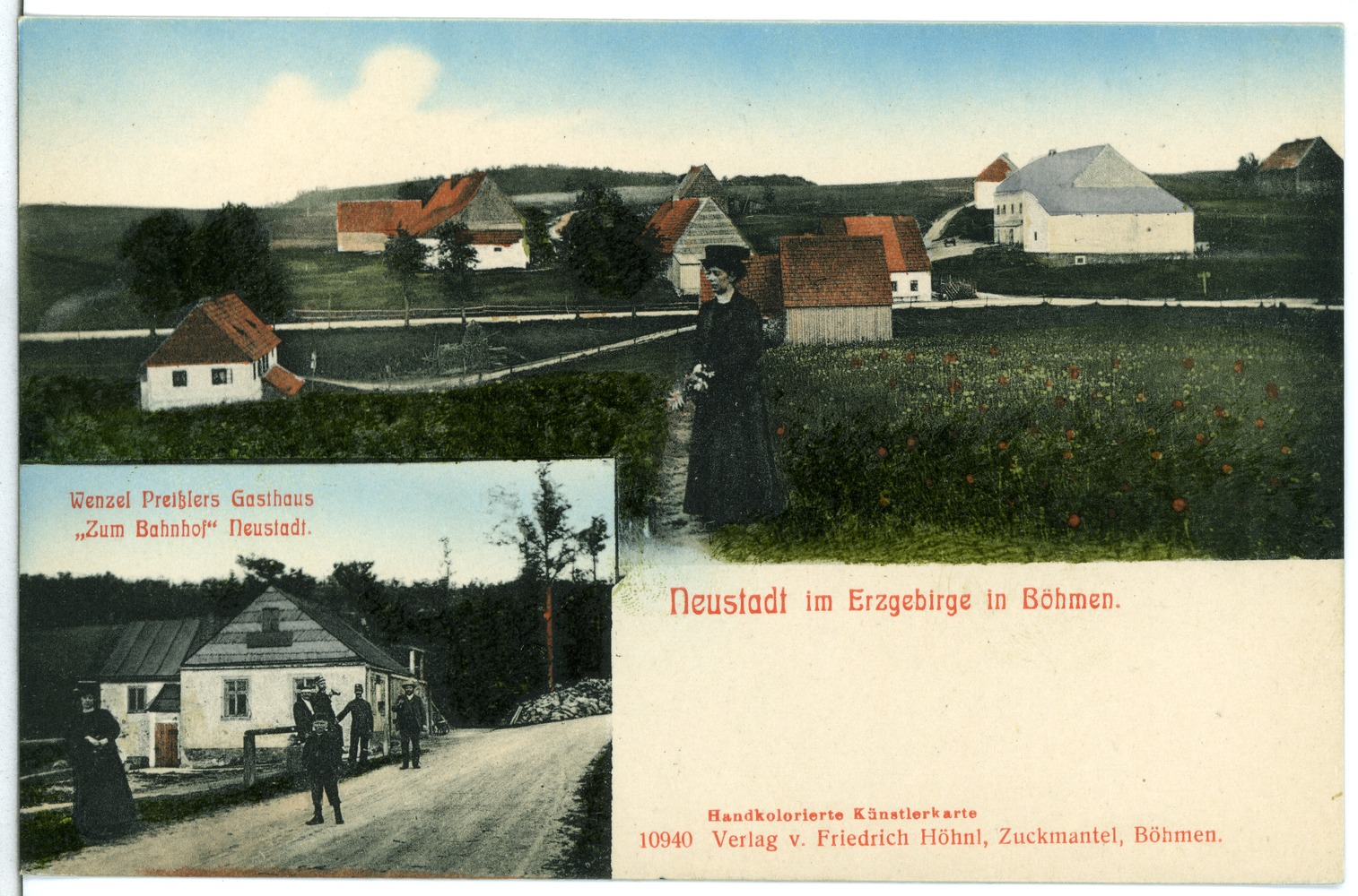 Neustadt/Böhmen; Ortsansicht This postcard is from publisher Brück & Sohn in Meißen ( postcard has a unique number 10940 and is available in a higher resolution at the publisher. This images was uploaded in a cooperation project between Wikipedians and the publisher.